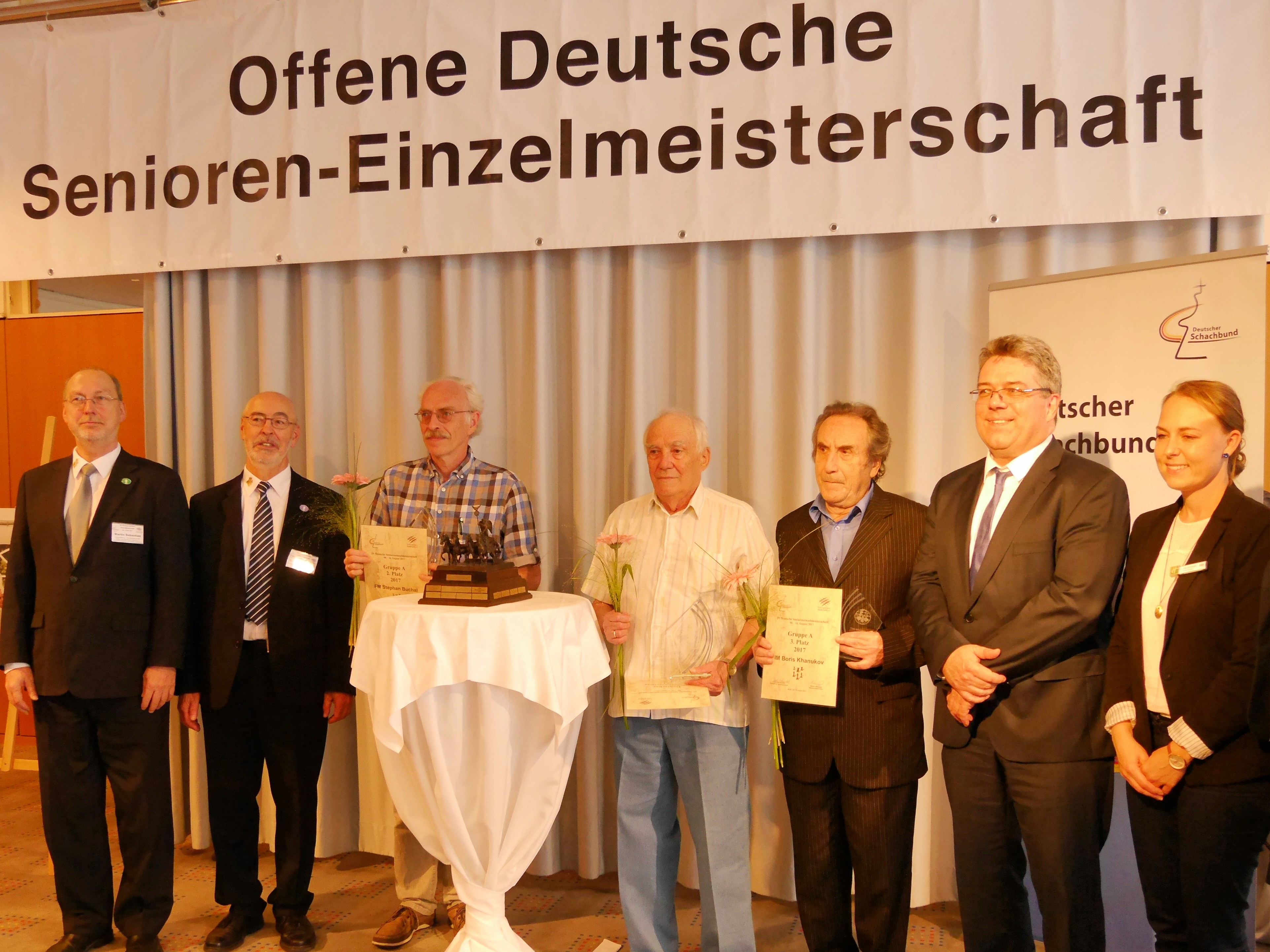 Gruppenbild zur Siegerehrung der deutschen Schachmeisterschaft der Senioren 2017 in Berlin. Von links nach recht: Martin Sebastian, Gerhard Maiwald, Stephan Buchal (2.), Jefim Rotstein (1.), Boris Khanukov (3.), Ullrich Krause und Cathlen Großmann (Hotel Event Managerin).